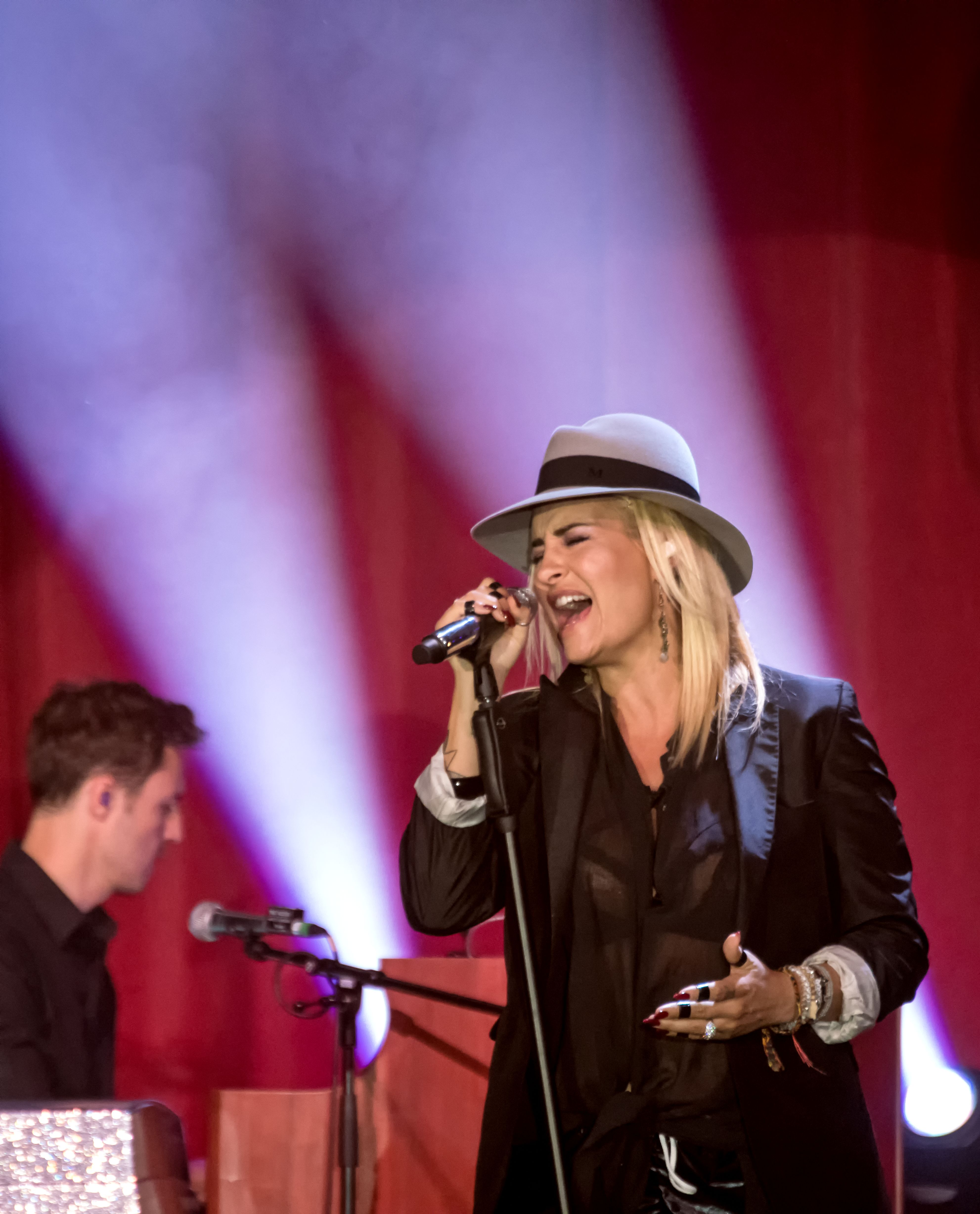 Bilder vom Zelt Musik Festival 2016 in Freiburg im Breisgau Sarah Connor